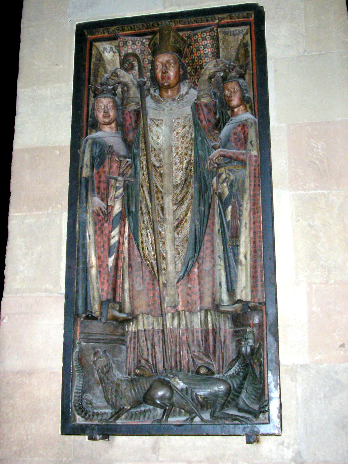 Bildmotiv: Grabdenkmal des Mainzer Erzbischofs Siegfried III. von Eppstein: Siegfried (Mitte) setzt Heinrich Raspe und Wilhelm von Holland die Krone auf; Quelle: eigene Fotografie vom 03.01.05; Lizenz: GNU-FDL